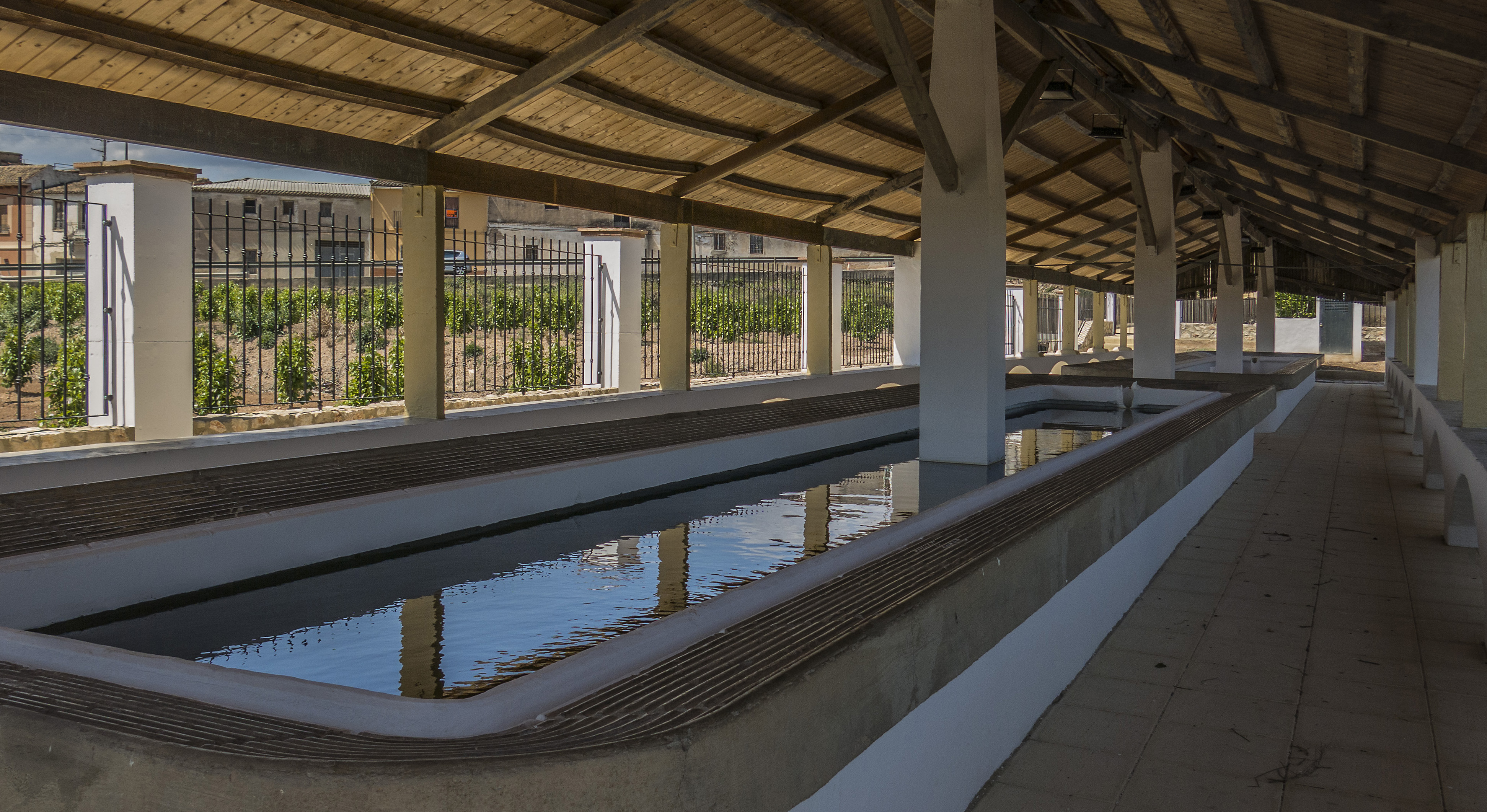 Municipi del País Valencià, situat a la comarca de la Ribera Alta. Aquesta imatge ha sigut publicada en: País Valencià poble a poble, Massalavés, 30-06-2017